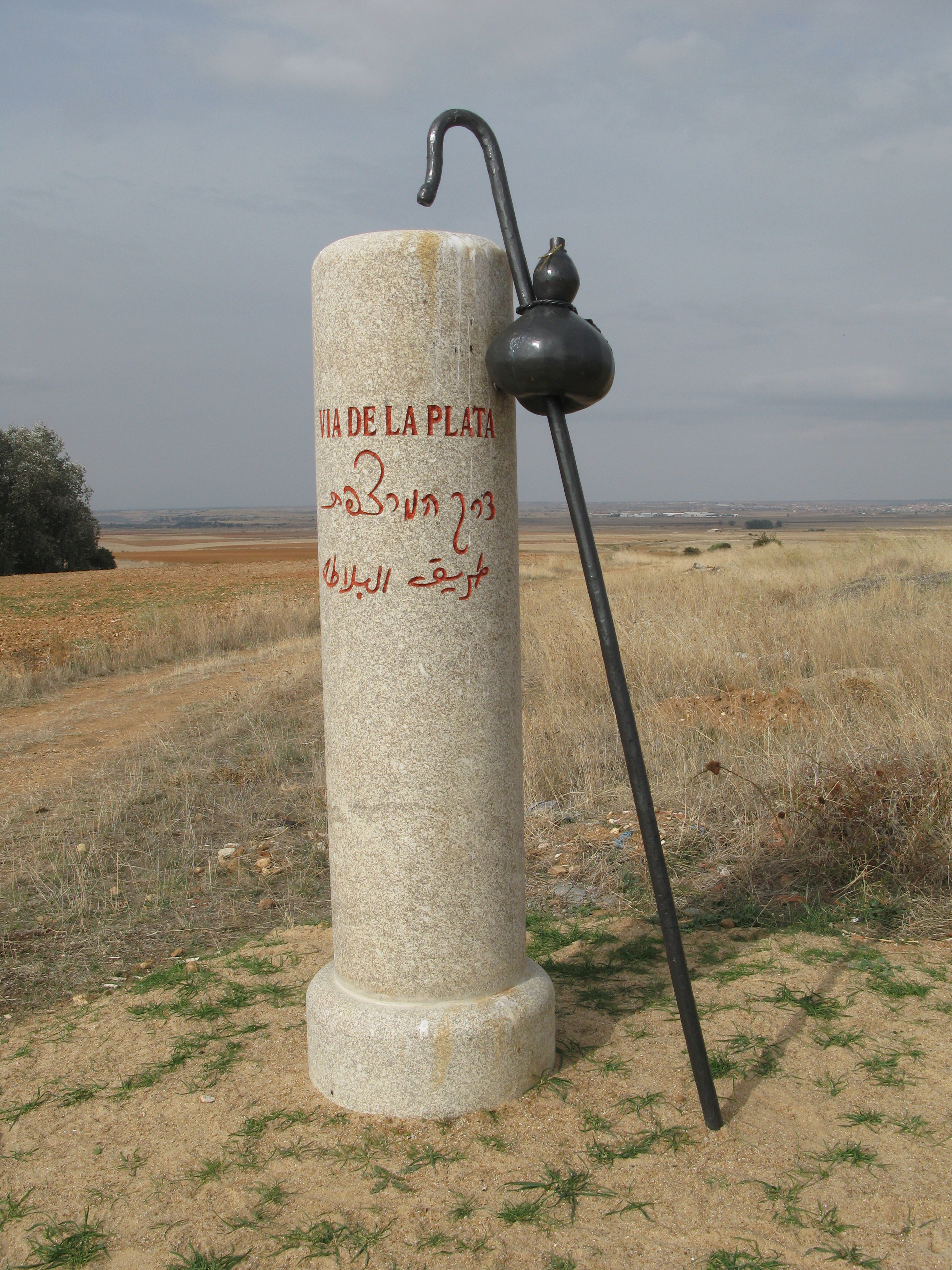 Monolito de señalización de la Vía de la Plata en la carretera que une los municipios de Peñausende y Zamora en España